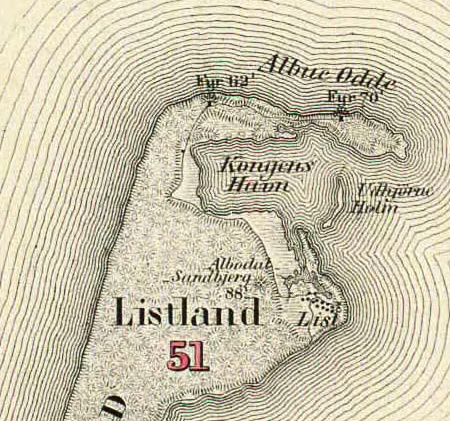 Detail fra: J. H. Mansa: Nörrejylland 1863 - Anden omarbeidede og forbedrede Ugave, 1858-1859